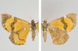 Hagnagora mesenata